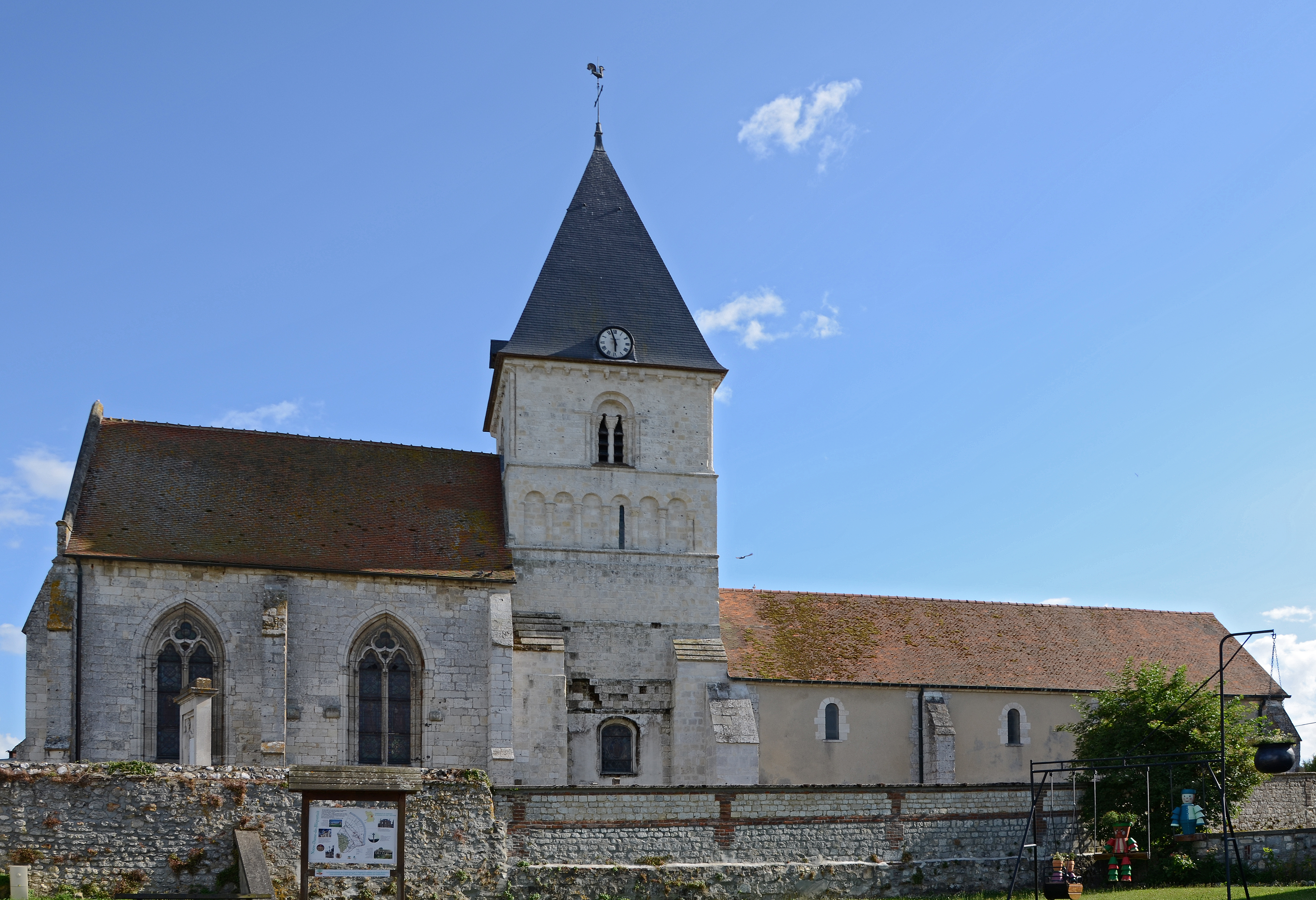 Eglise de Notre-Dame-de-Bliquetuit, Seine Maritime, France .